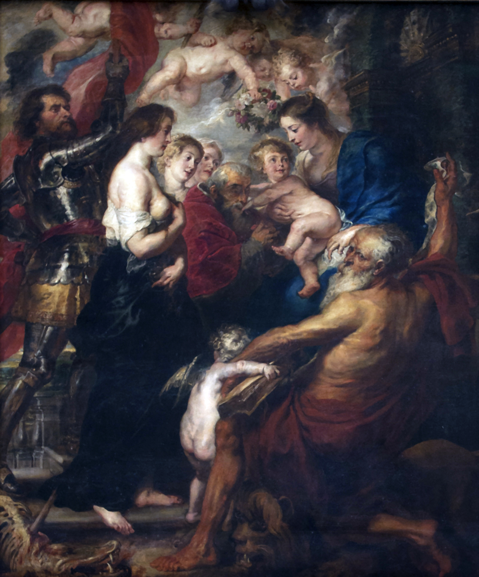 Peter Paul Rubens (1577-1640) - Onze-Lieve-Vrouw omringd door heiligen - grafkapel Sint-Jacobskerk Antwerpen 3-07-2012